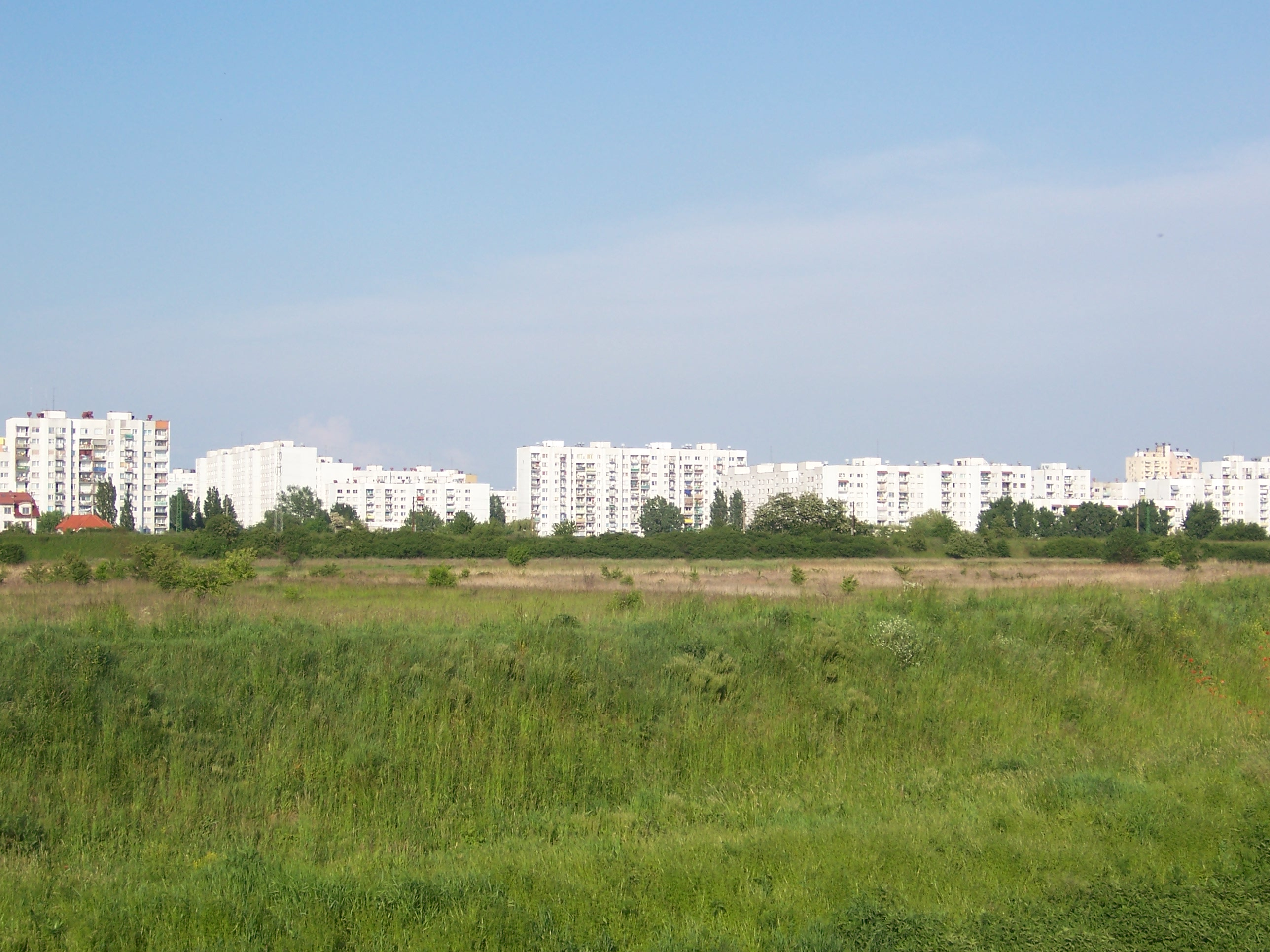 Wrocław - osiedle Nowy Dwór, panorama zza Ślęży